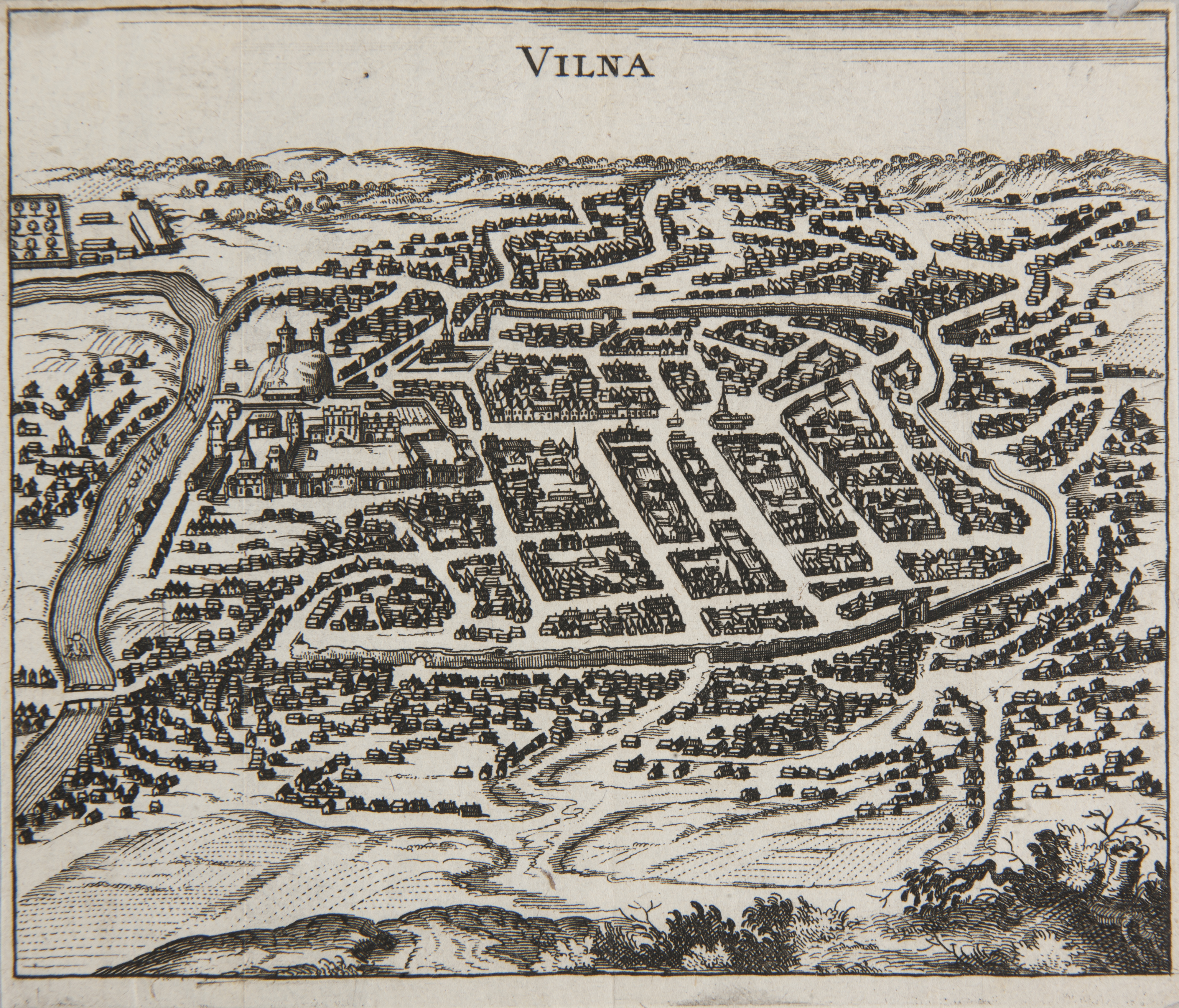 Беларуская (тарашкевіца): Вільня (Vilnia). Панарамны плян